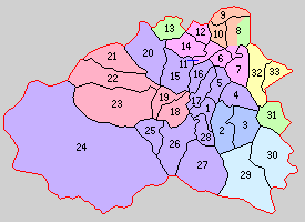 秩父郡の町村